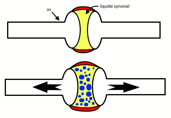 Le bruit de craquement audible lors d'un ajustement chiropratique provient de l'expension rapide de gaz dans le liquide synovial contenu dans la capsule articulaire.